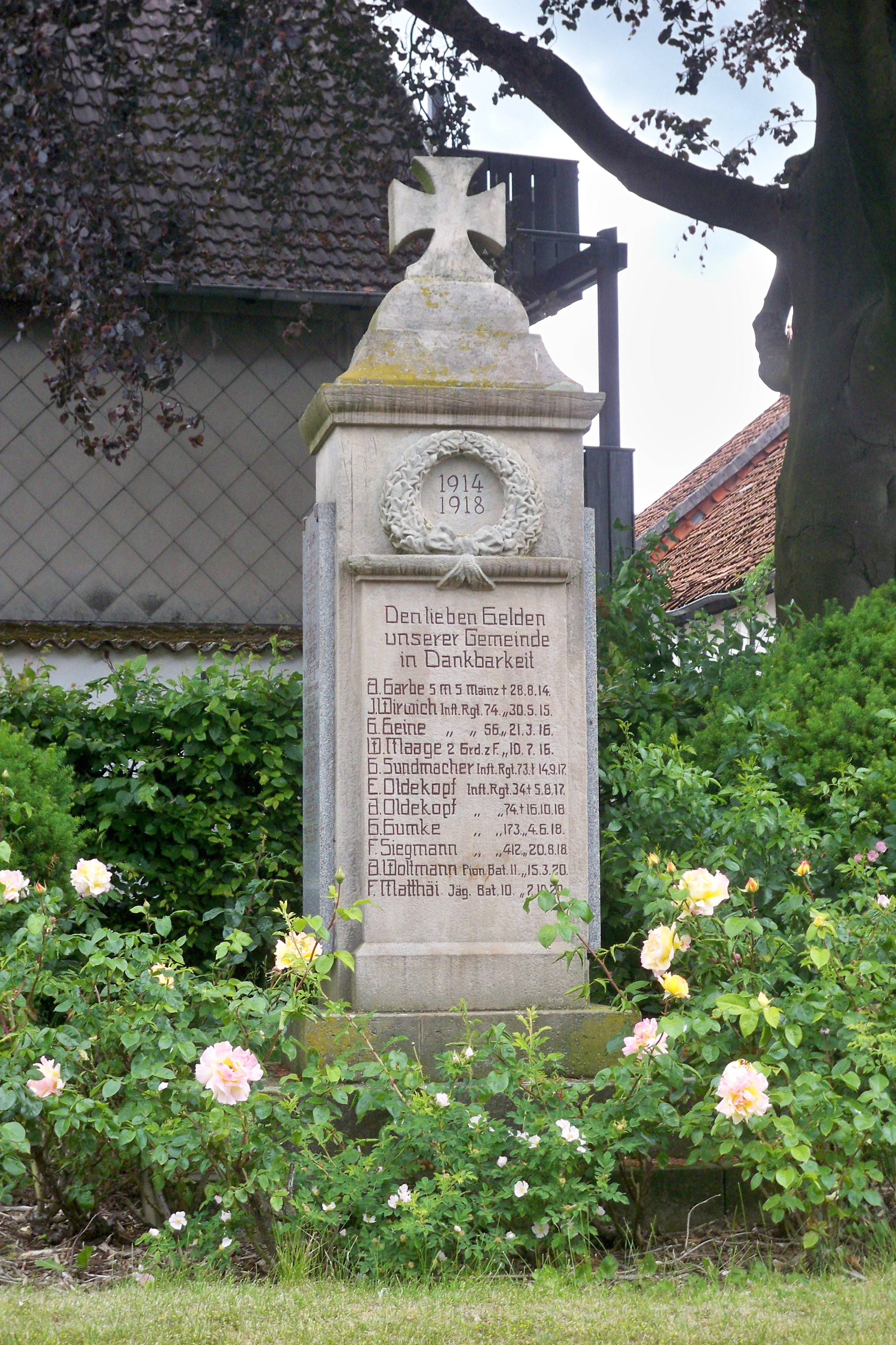 Dies ist das Kriegerdenkmal das im Ortskern von Degersen steht. Dieses Kriegerdenkmal ist zum Gedenken der Gefallenen des 1. Weltkrieges